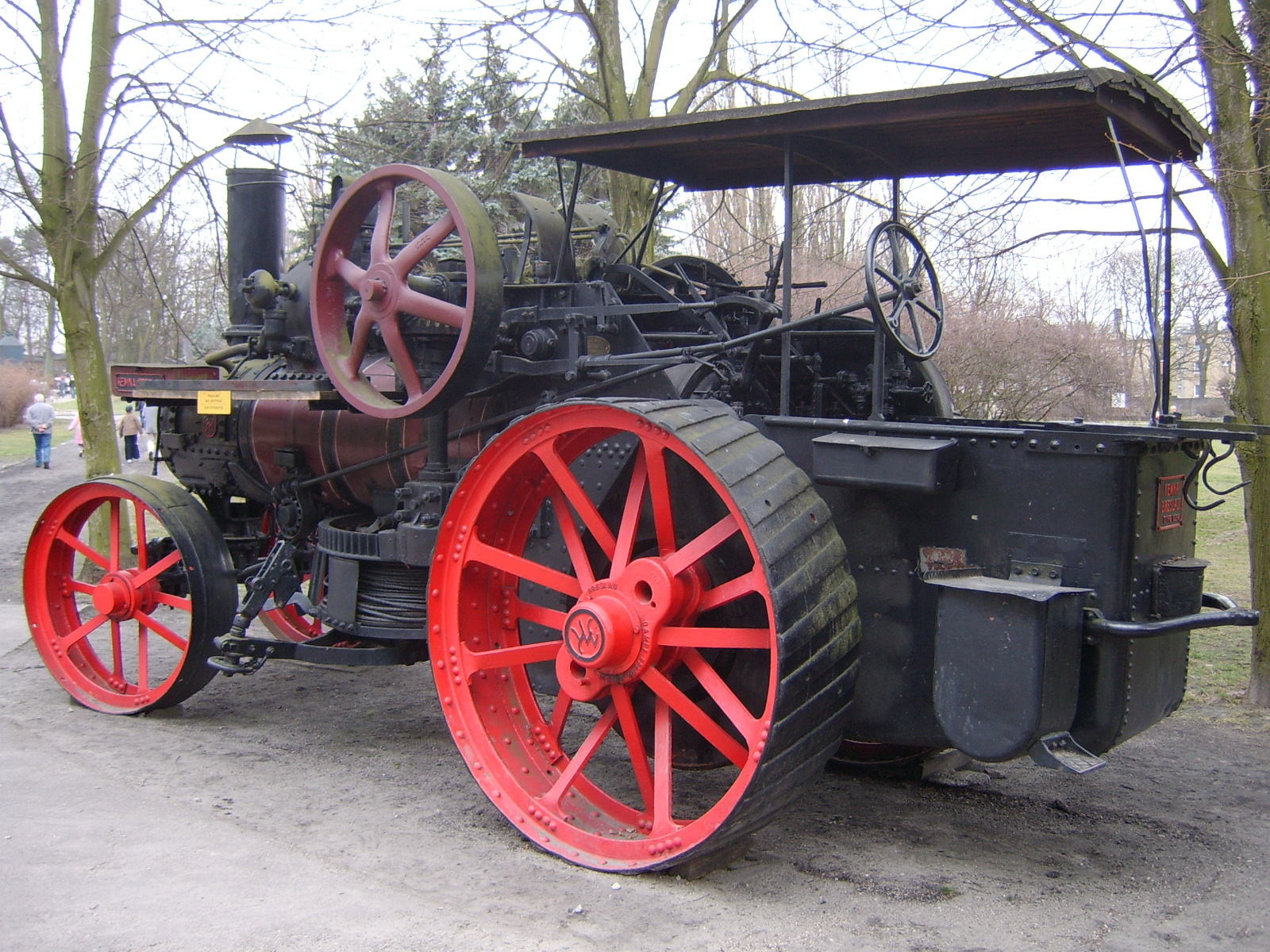 Muzeum Narodowe Rolnictwa i Przemysłu Rolno-Spożywczego w Szreniawie (Lokomobila samobieżna produkcji Kemna-Breslau z 1927 roku)